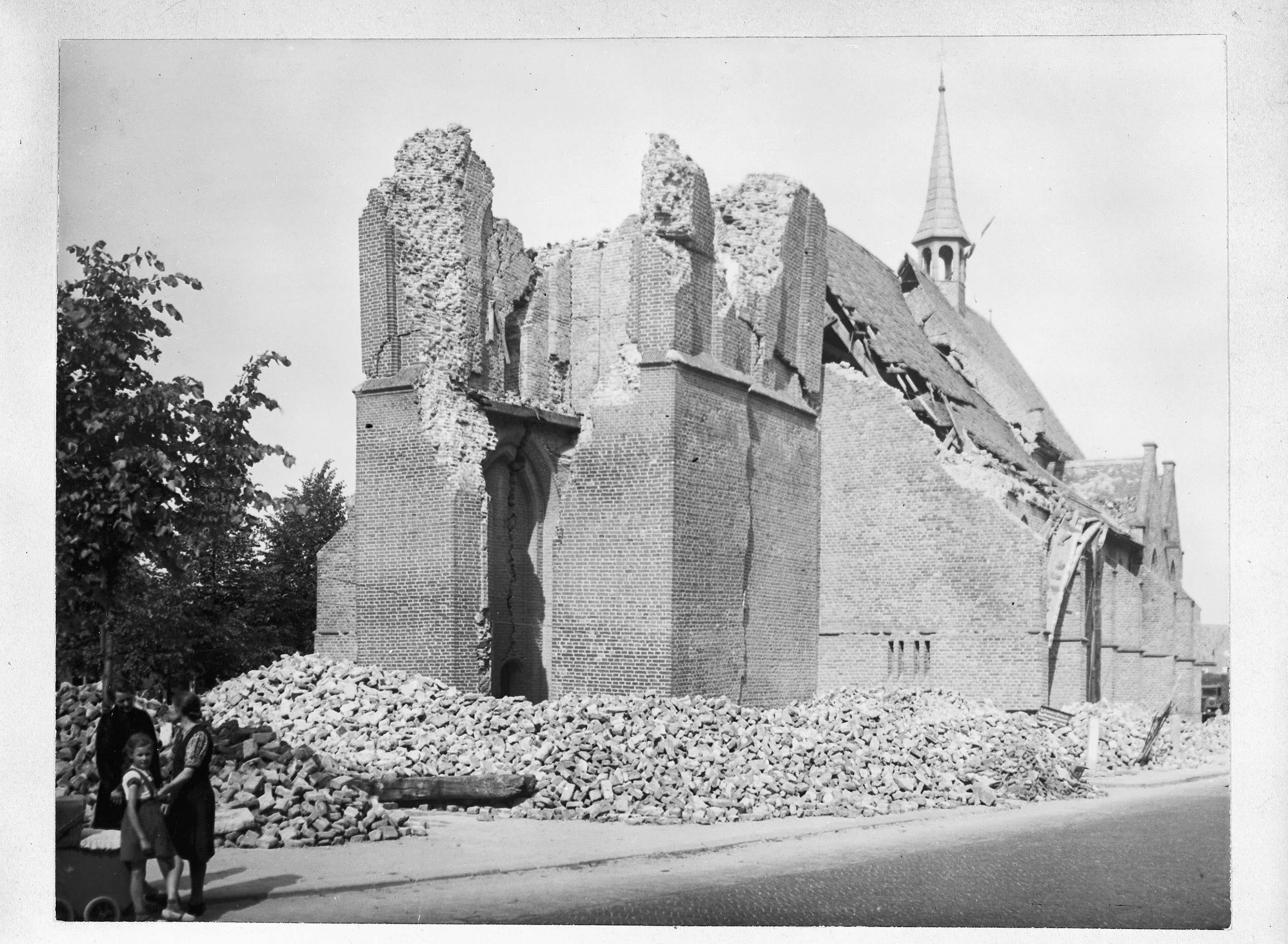 Nederlands Hervormde Kerk: exterieur zuid-west zijde